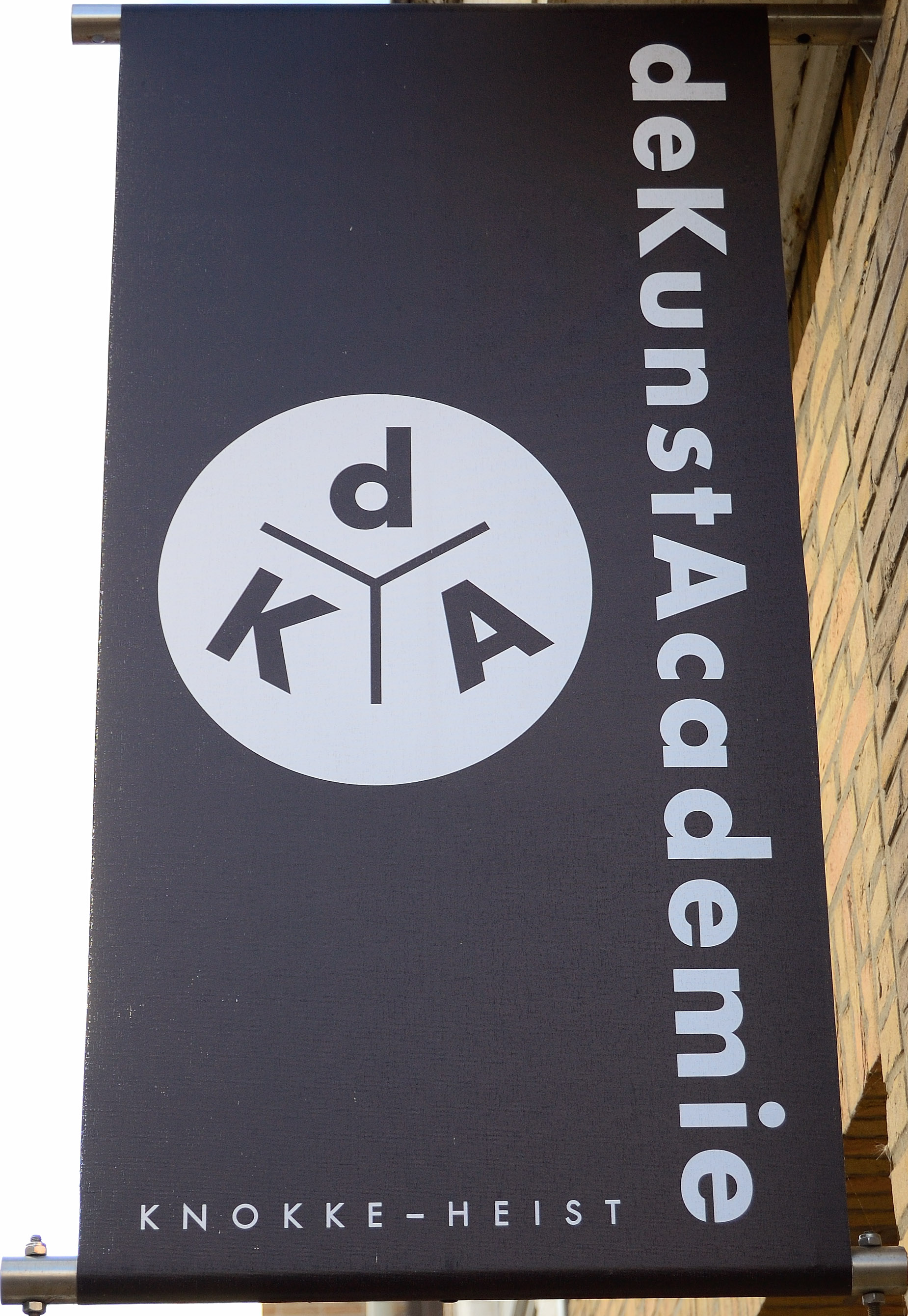 Uithangbord met logo en benaming van deKunstacademie aan de ingang in de Van Steenestraat 9 te 8300 Knokke-Heist, België.